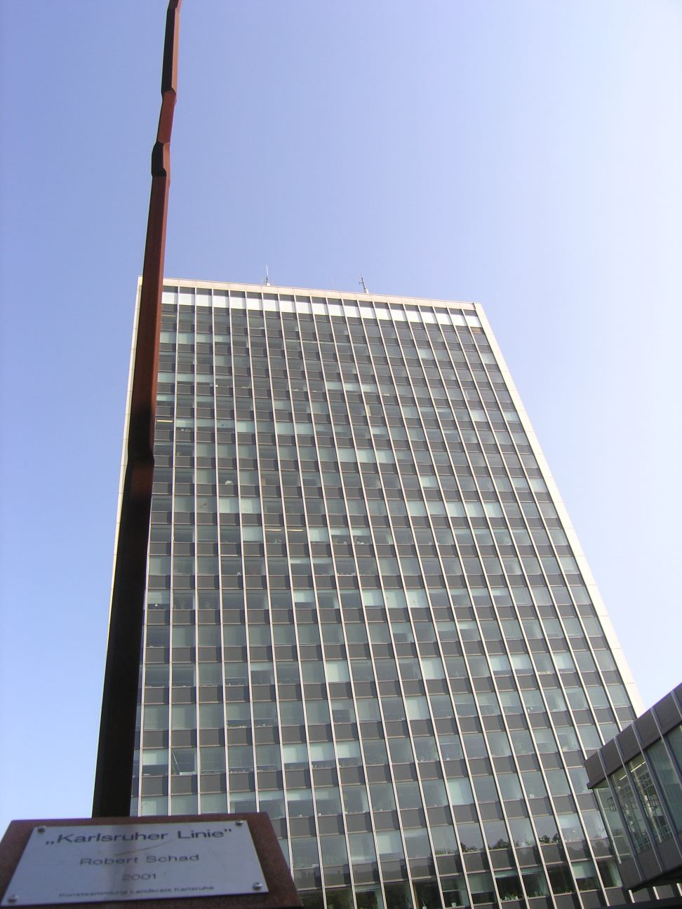 Landratsamt Karlsruhe (vorher Badenwerk), Kunstwerk Karlsruher Linie (2001) von Robert Schad